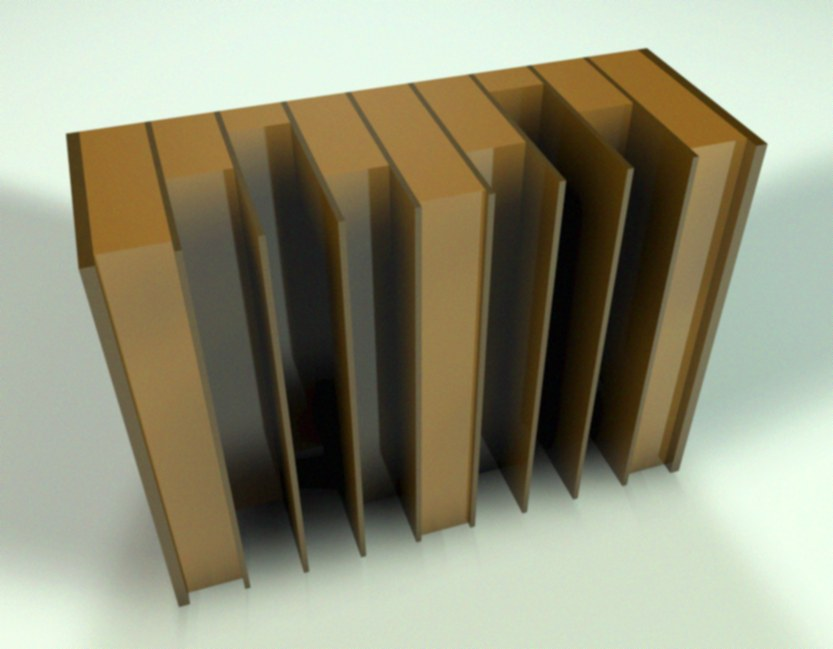 akustischer Diffusor - Bauprinzip